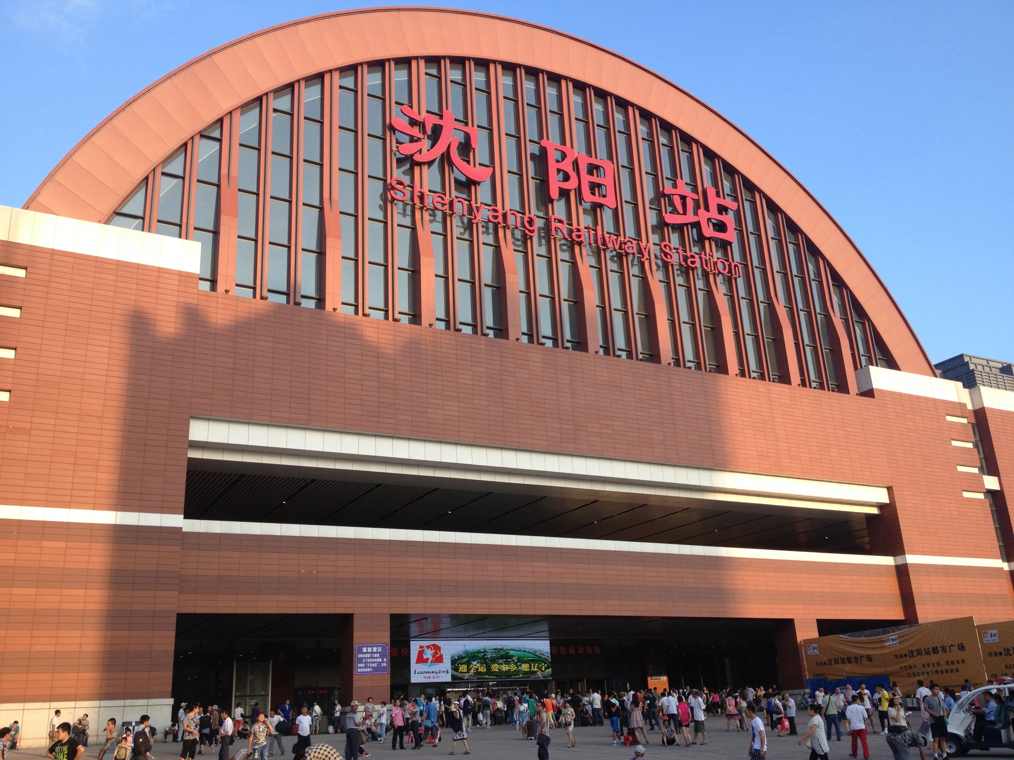 中文（中国大陆）: 沈阳站西站房